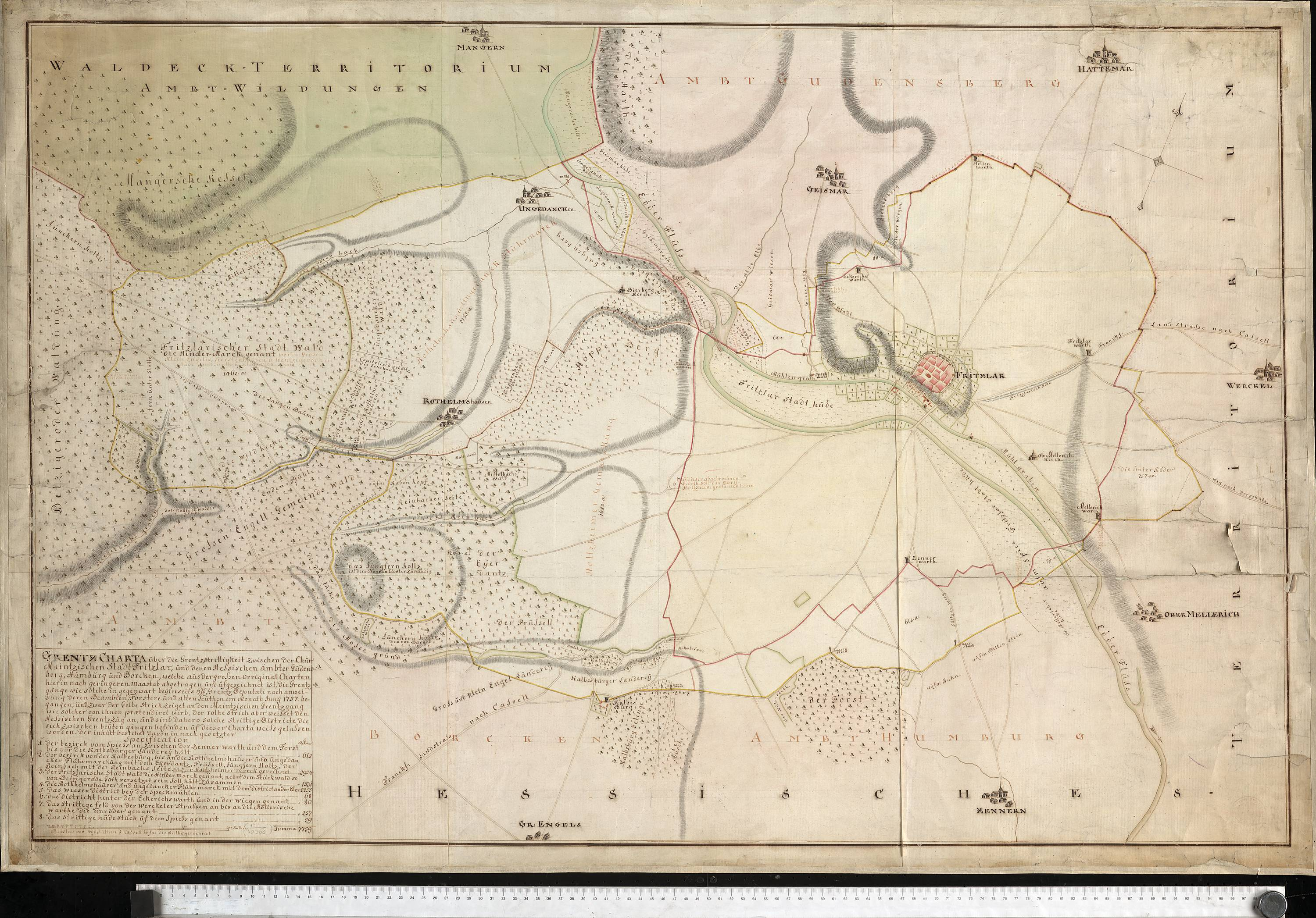 Grenzstreitigkeiten zwischen der kurmainzischen Stadt Fritzlar und den hessischen Ämtern Gudensberg, Homberg und Borken, mit Darstellung der Orte Fritzlar, Haddamar, Geismar, Mandern, Ungedanken, Rothelmshausen, Zennern, Obermöllrich und Werkel, 1760 (Hessisches Staatsarchiv Marburg Karten Nr. P II 15628). Zum Archivale